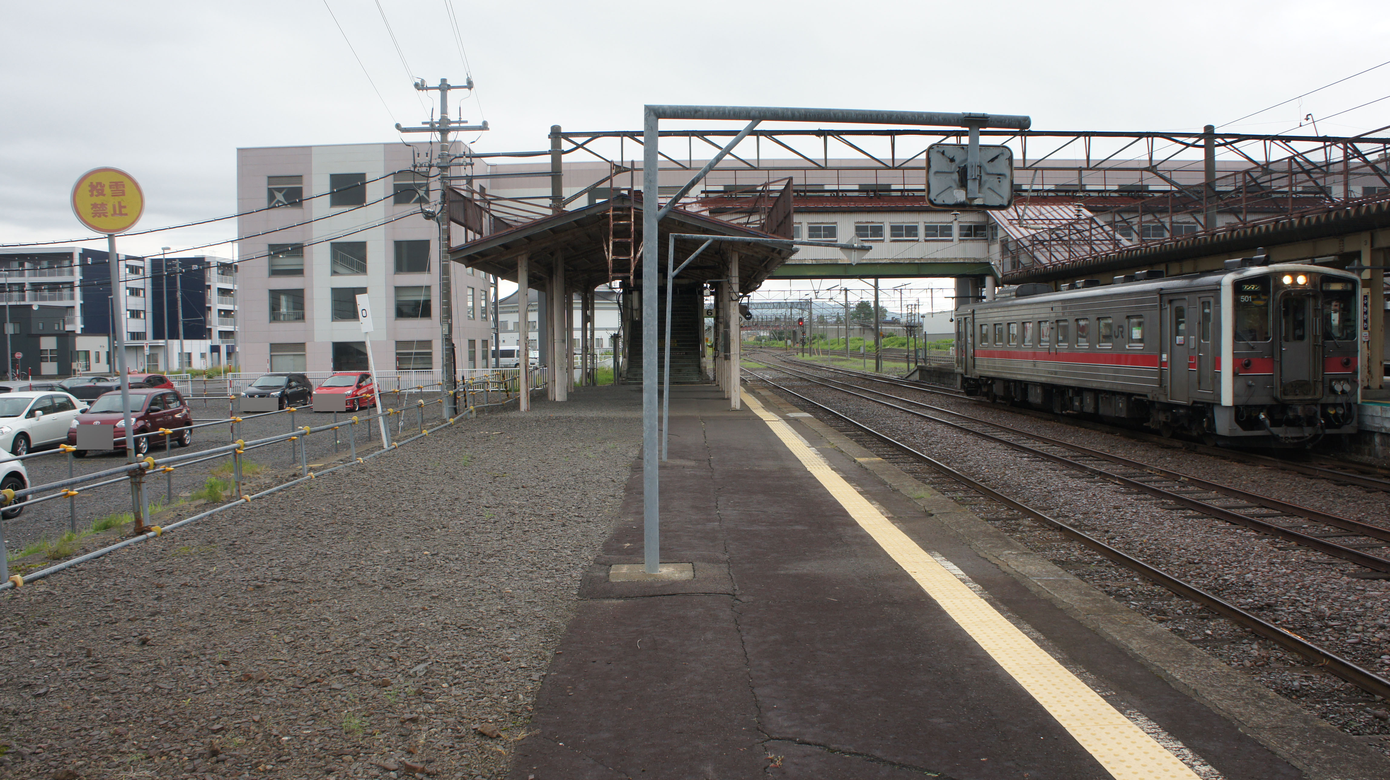 JR函館本線/留萌本線・深川駅の6番線ホーム Sony NEX-3